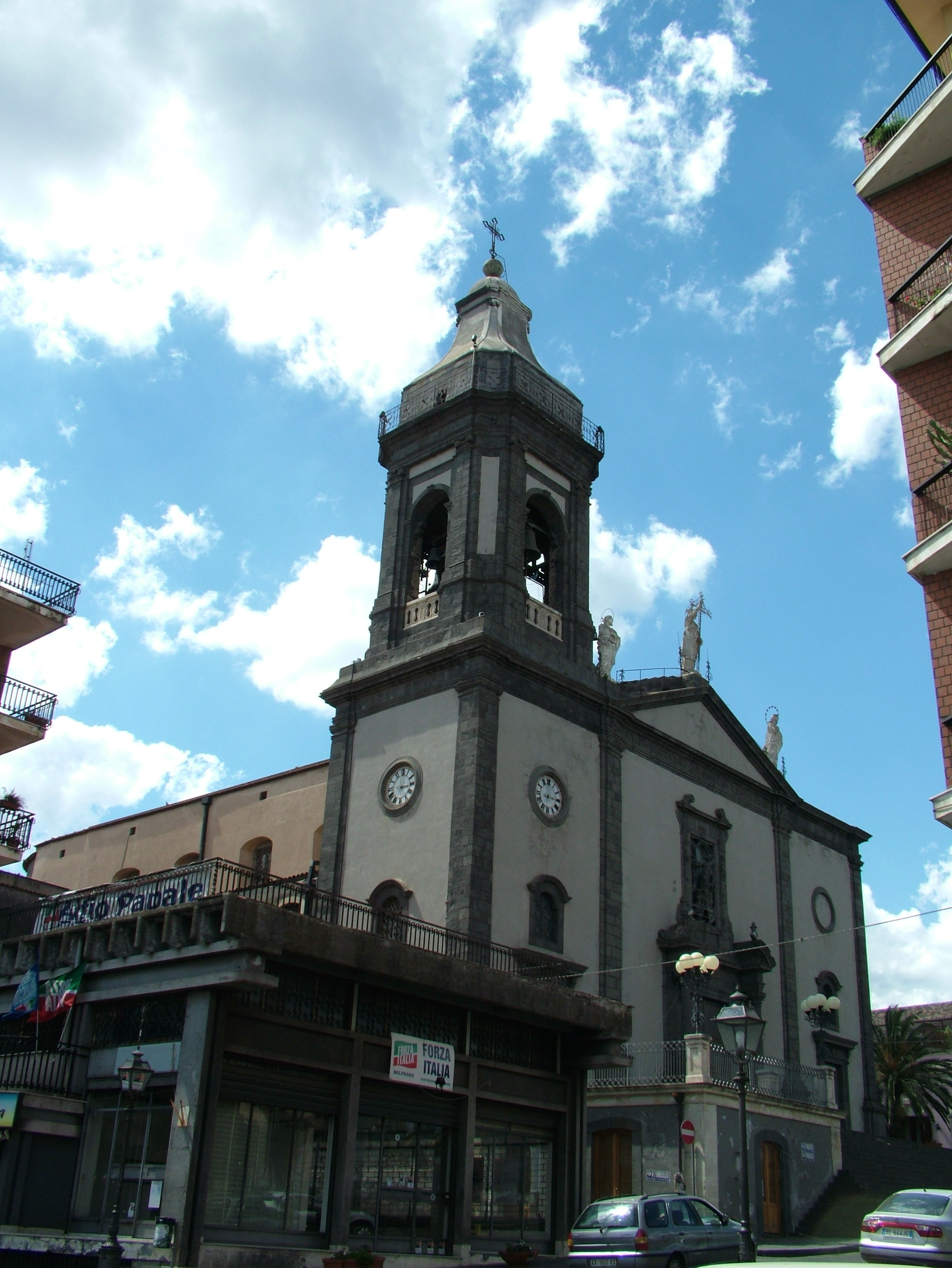 Belpasso, Provinz Catania, sizilien, die Kirche Sant Lucia